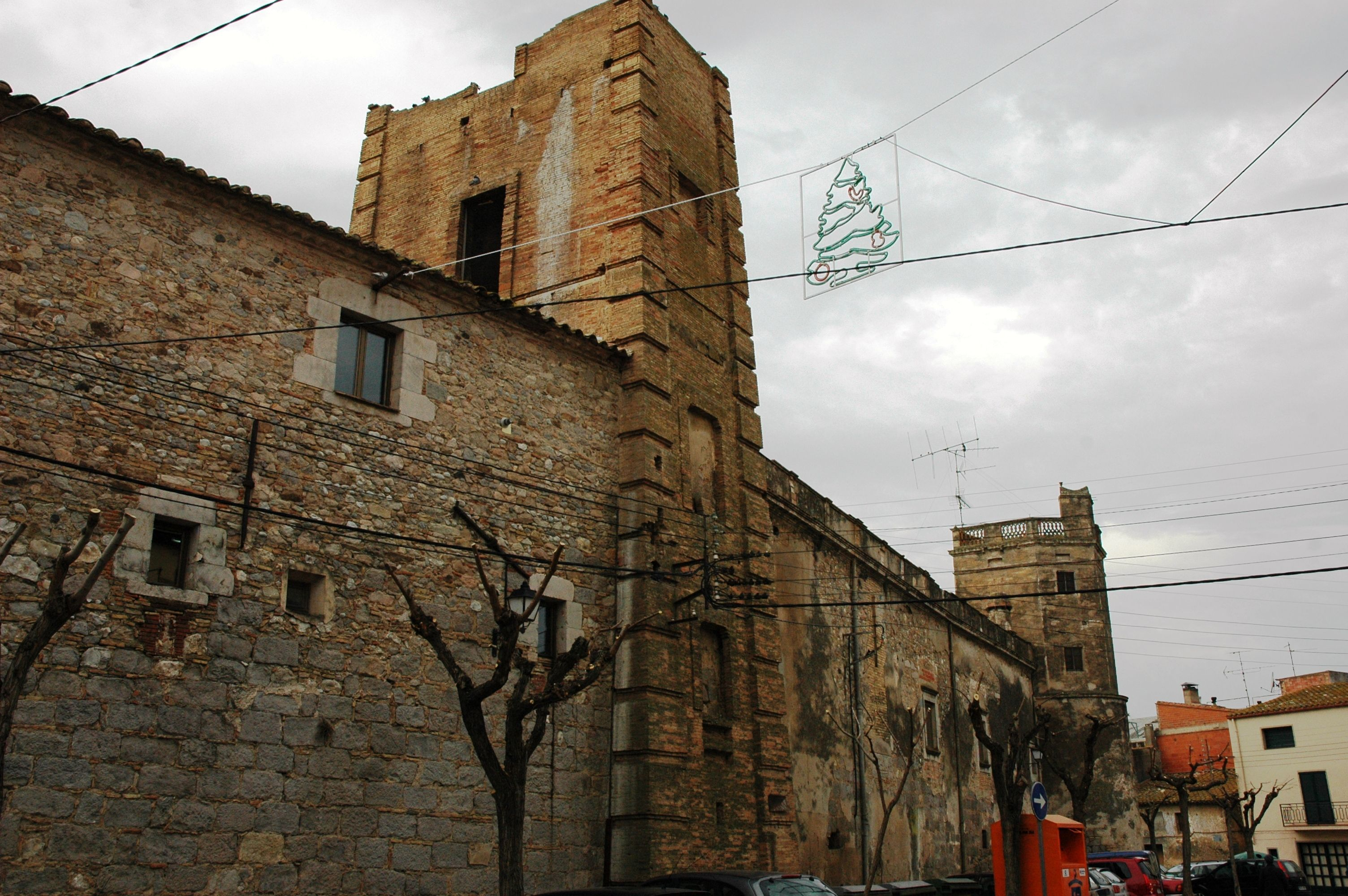 Casa Caramany, Sant Pere Pescador